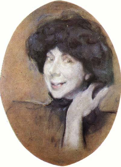 Бенуа Анна Карловна (урожд. Кинд, жена А.Н. Бенуа)